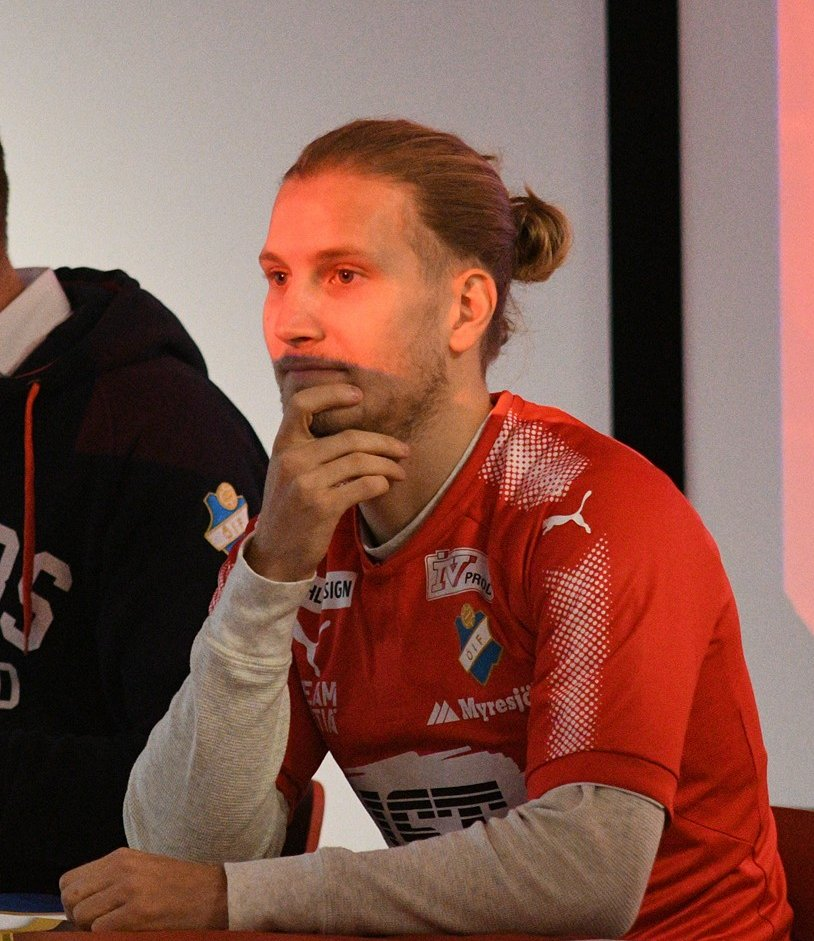 Fotbollsspelaren Oliver Silverholt presenteras för Östers IF 5/12 2017.